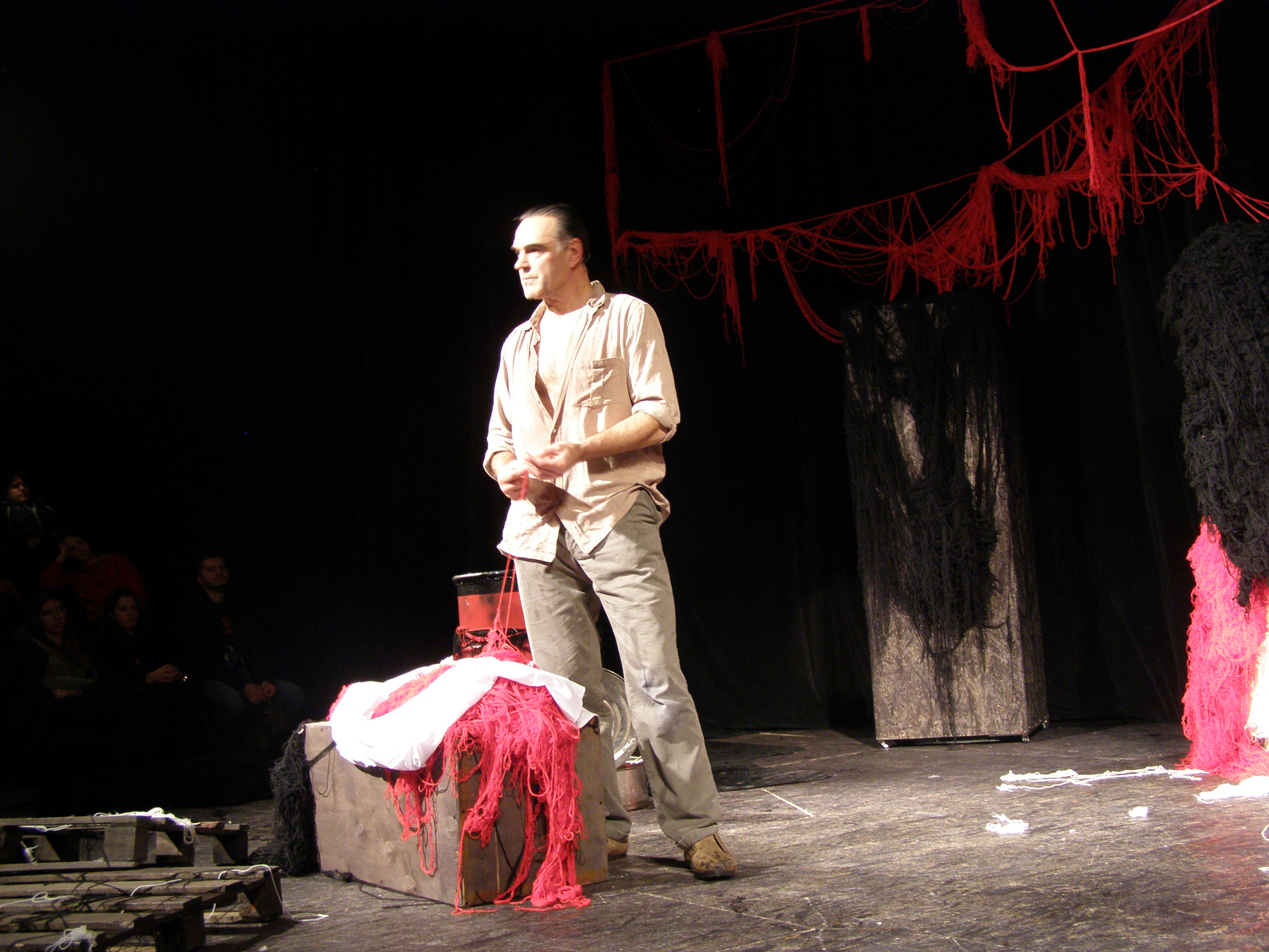 Народний артист України Мельник Михайло Васильович, Академічний український театр одного актора «Крик», вистава «Дикий»